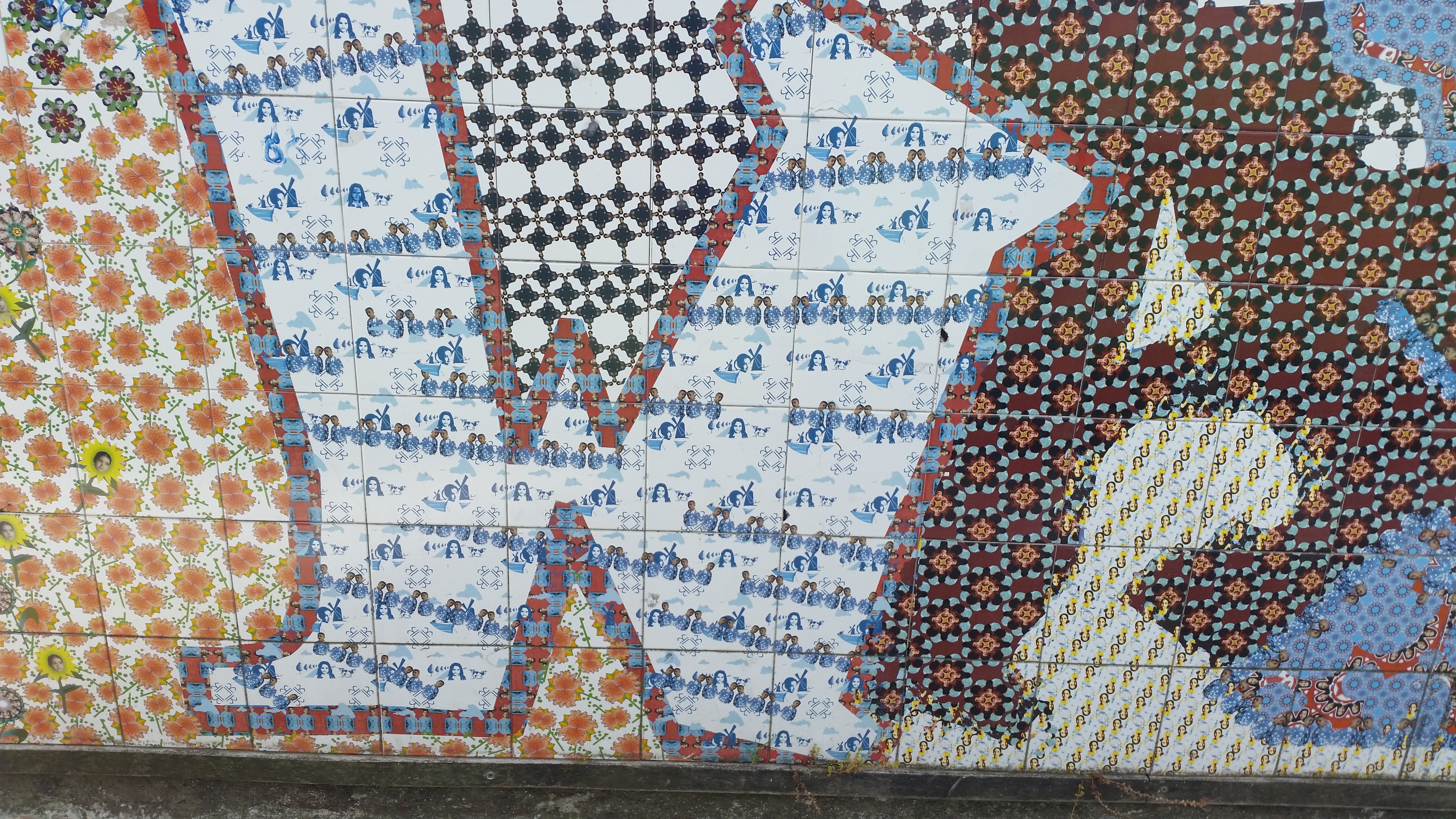 No war van Remco Swart/Marvin Lingers op het Balboaplein, Amsterdam-West